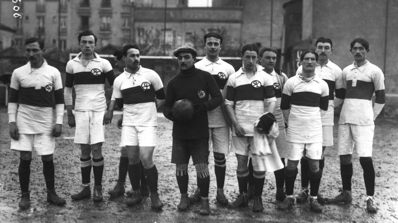 L'Olympique lillois le 22 mars 1914 avant sa demi-finale du championnat de France de football USFSA 1914 contre l'Union sportive servannaise.